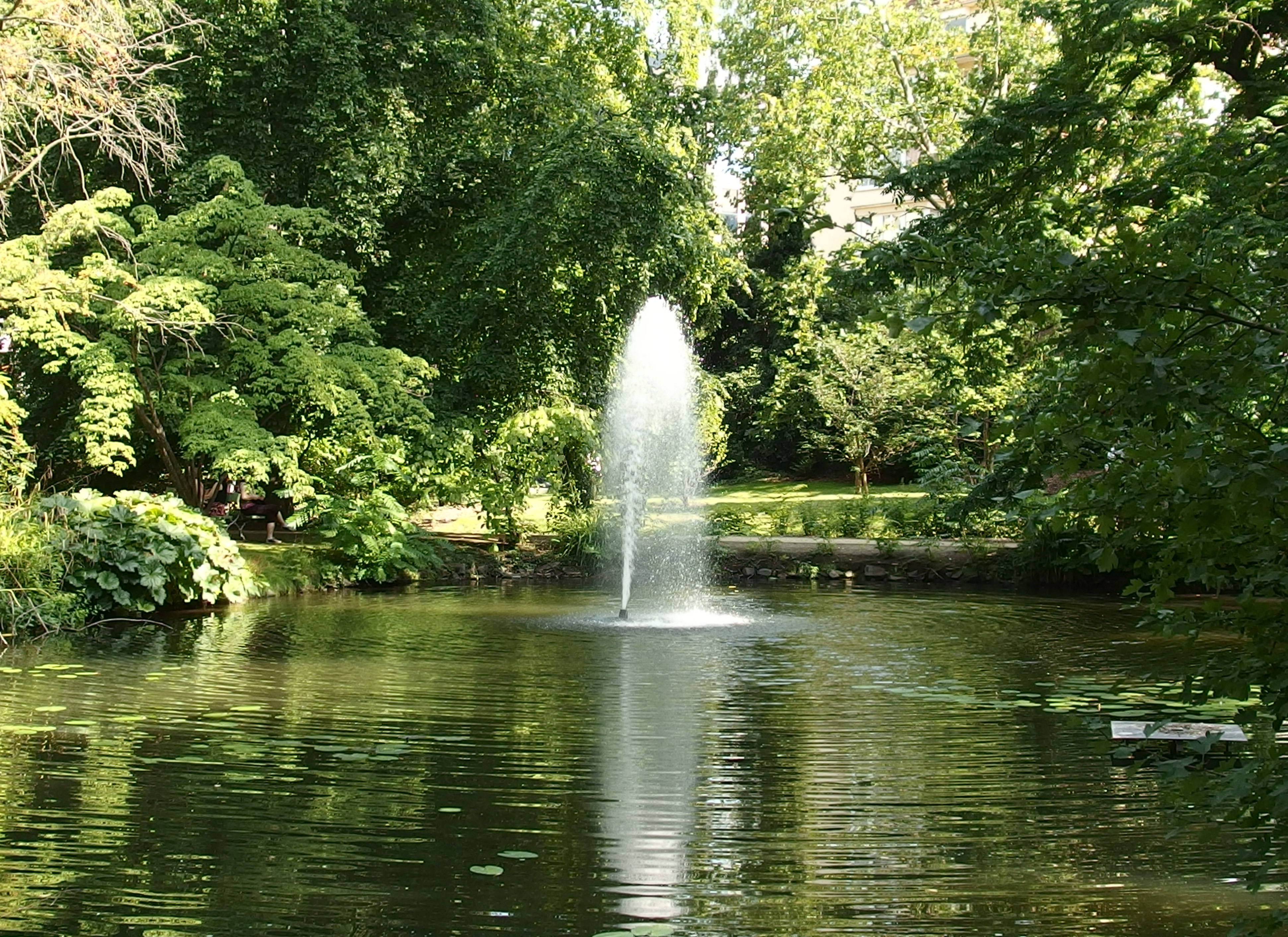 See mit Wasserfontäne im Malkastenpark, Düsseldorf